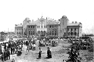 Железнодорожный вокзал Ейск, конец XIX - начало XX века